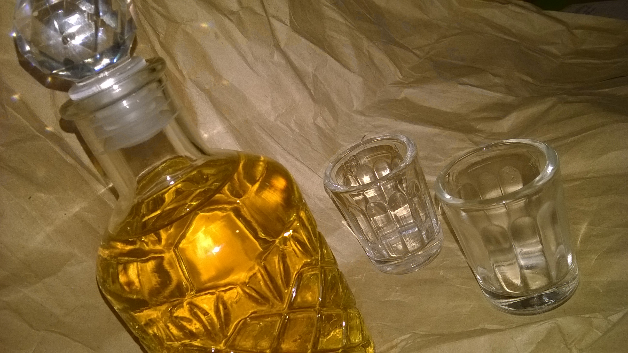 Kubánský rum v karafě.